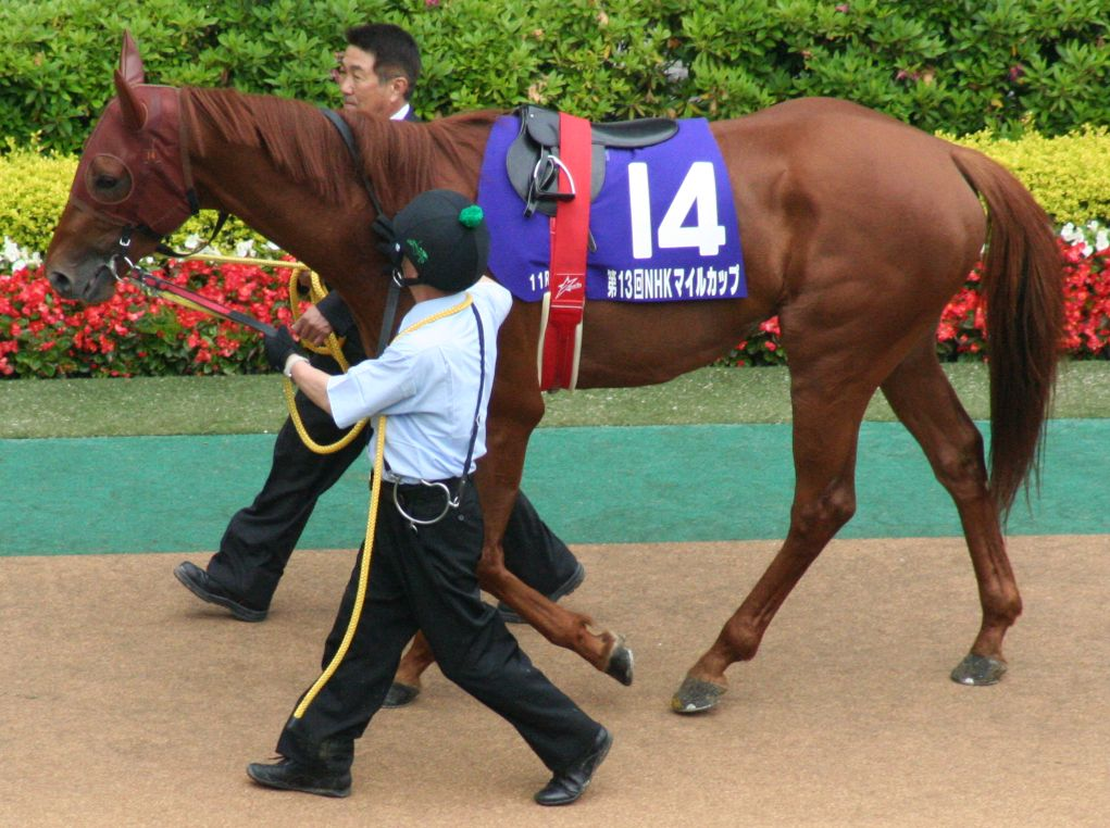 ダノンゴーゴー（東京競馬場）